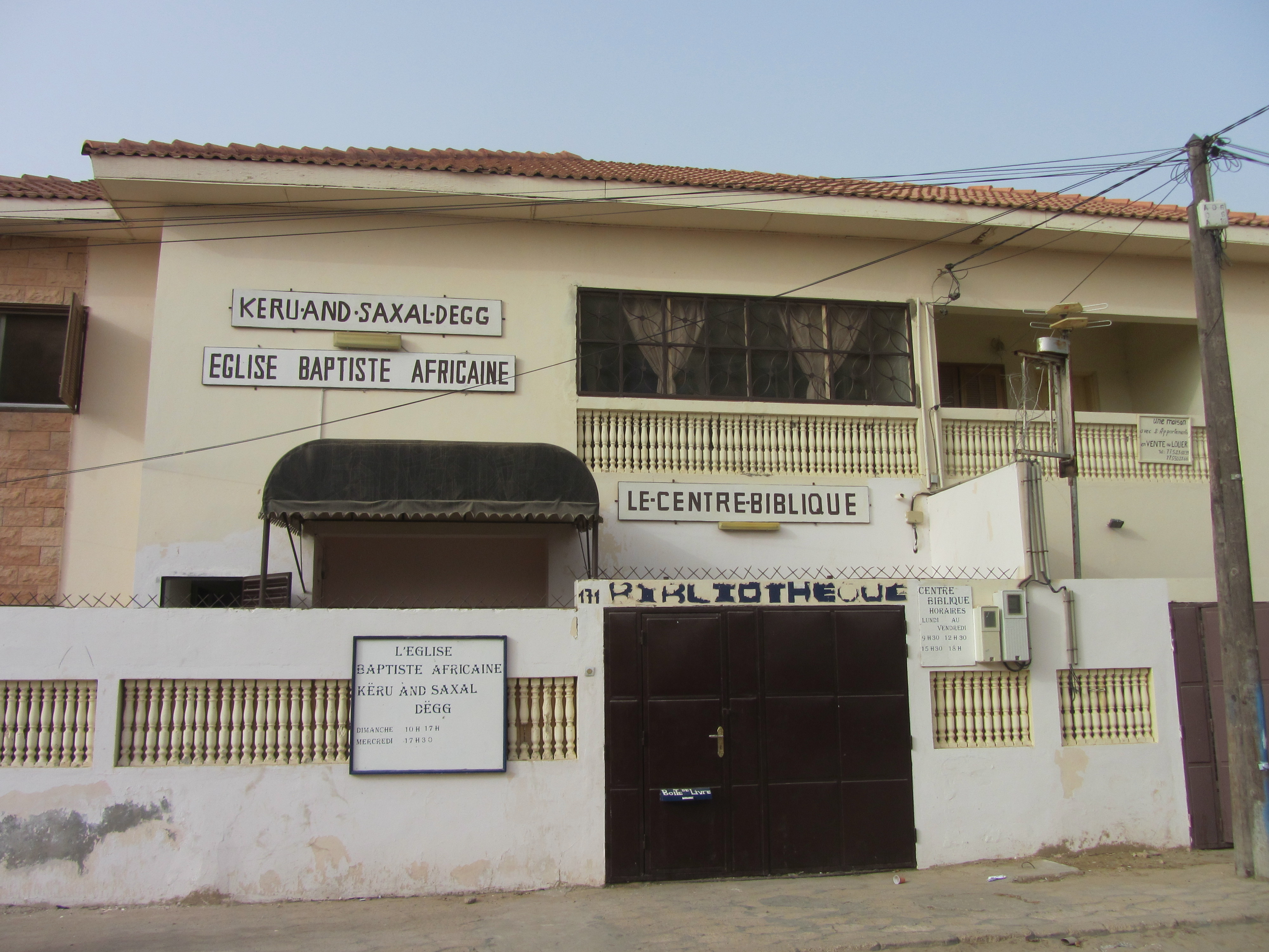 Saint-Louis : Eglise baptiste This document was produced using the Canon PowerShot SX230 HS lent by Wikimedia France.